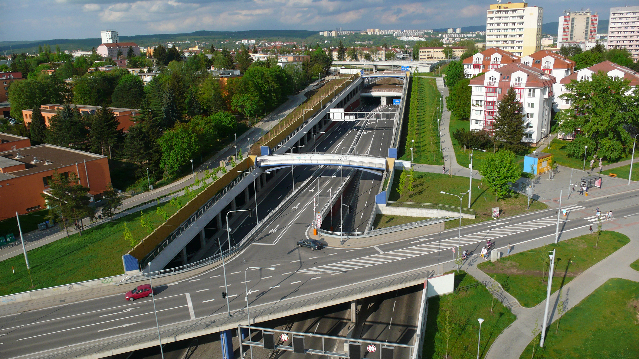 Královopolský tunel - výškové foto